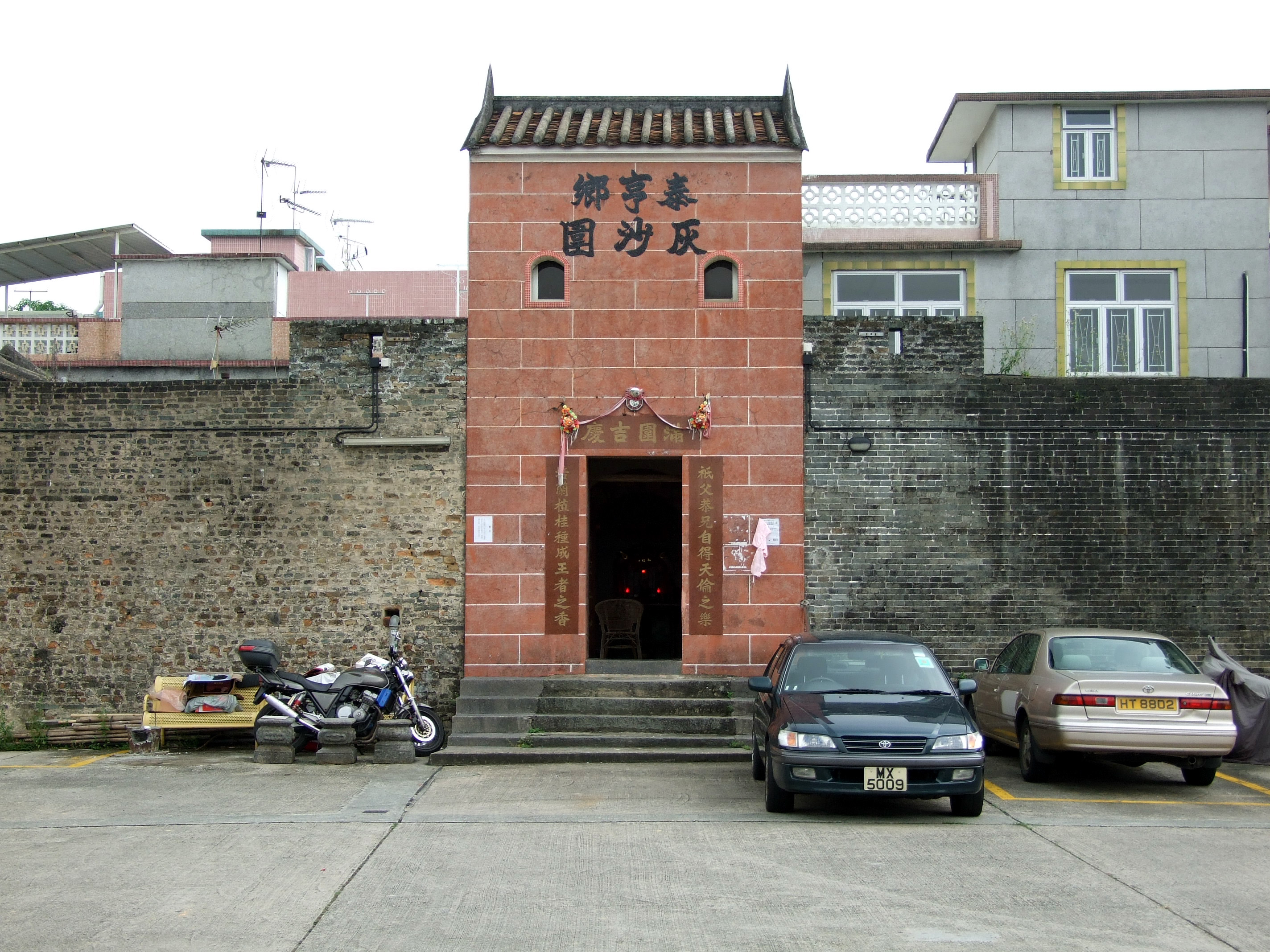 灰沙圍